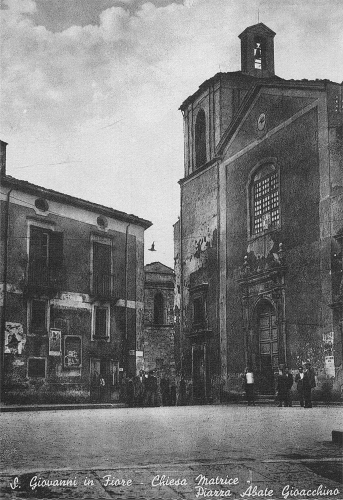 San Giovanni in Fiore - Chiesa Madre, cartolina anni '40